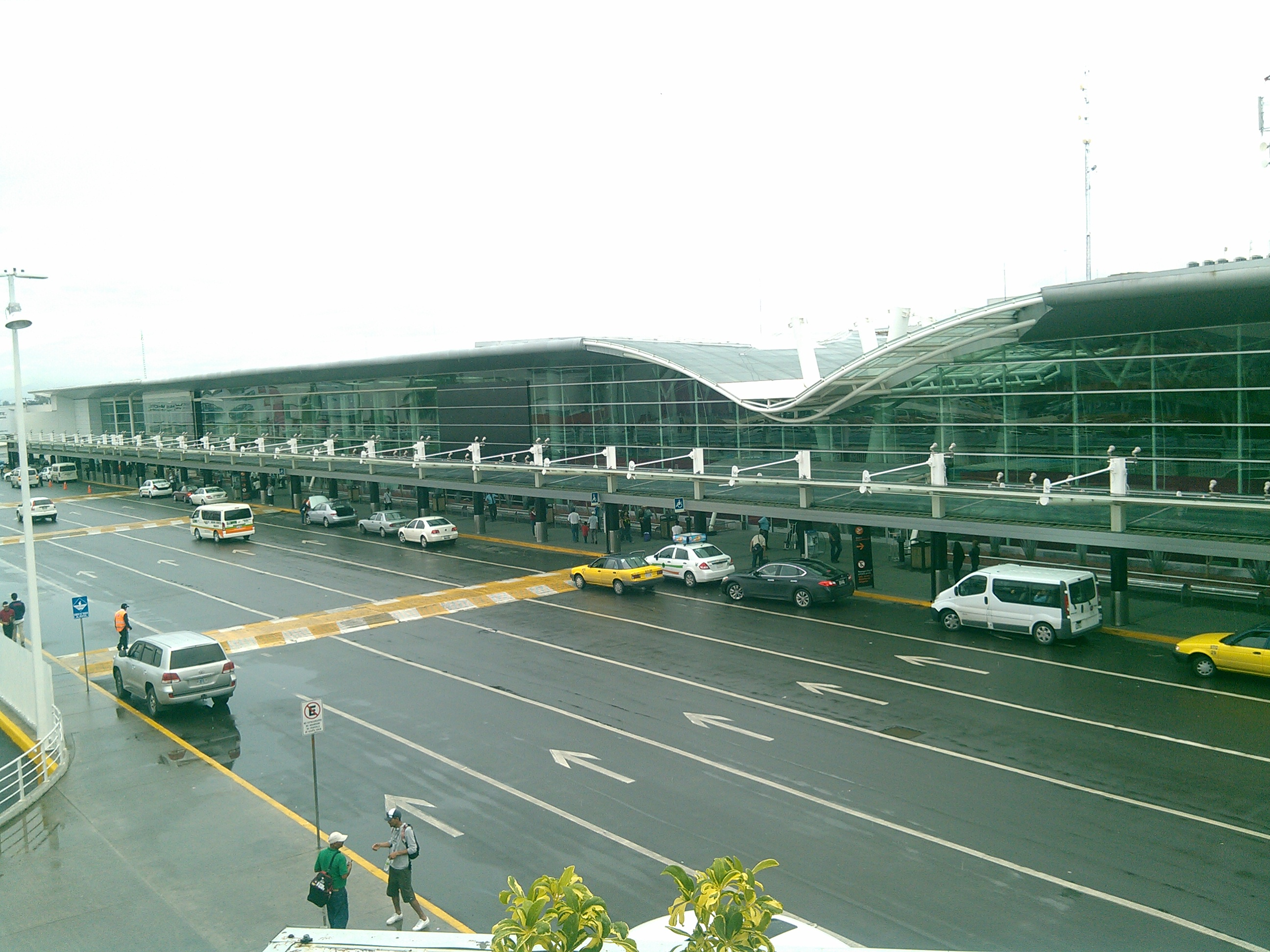 Aeropuerto Internacional de Guadalajara